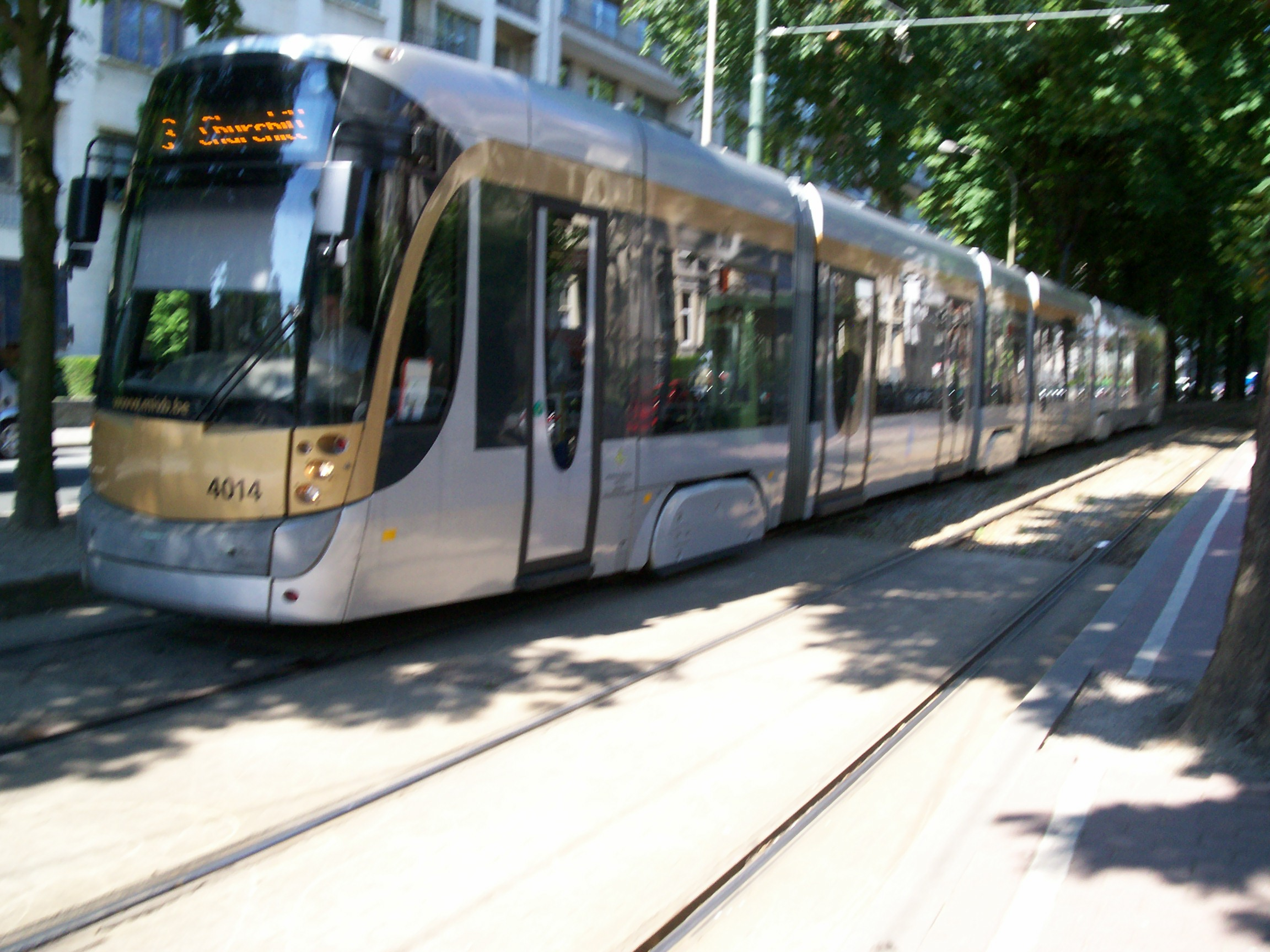 T 4000 au terminus Churchill, après avoir assuré une mission sur la ligne 3 en provenance de la Gare du Nord